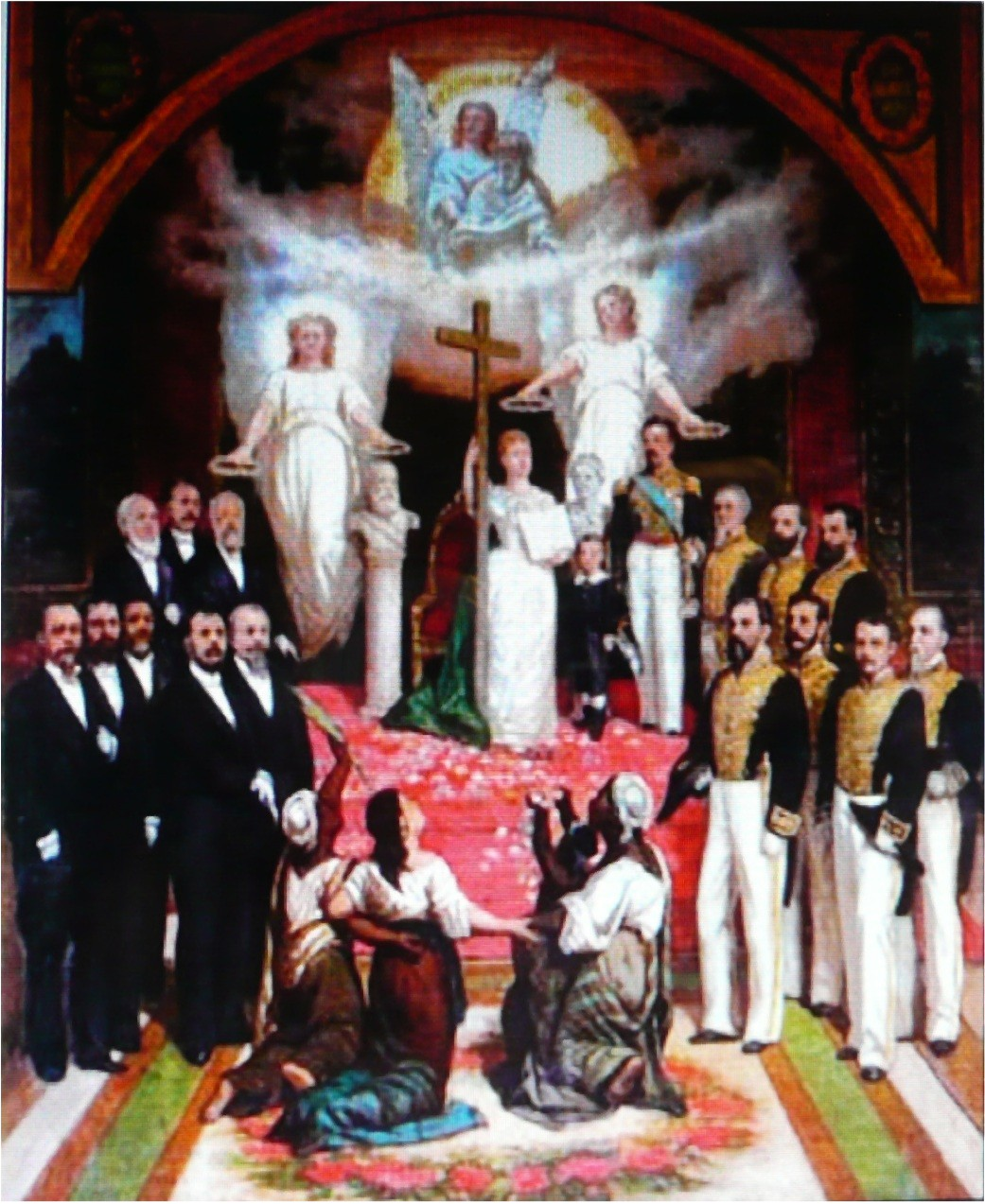 Lei Áurea. Óleo sobre tela, 66 x 56 cm. Escola de Belas Artes- UFBA.